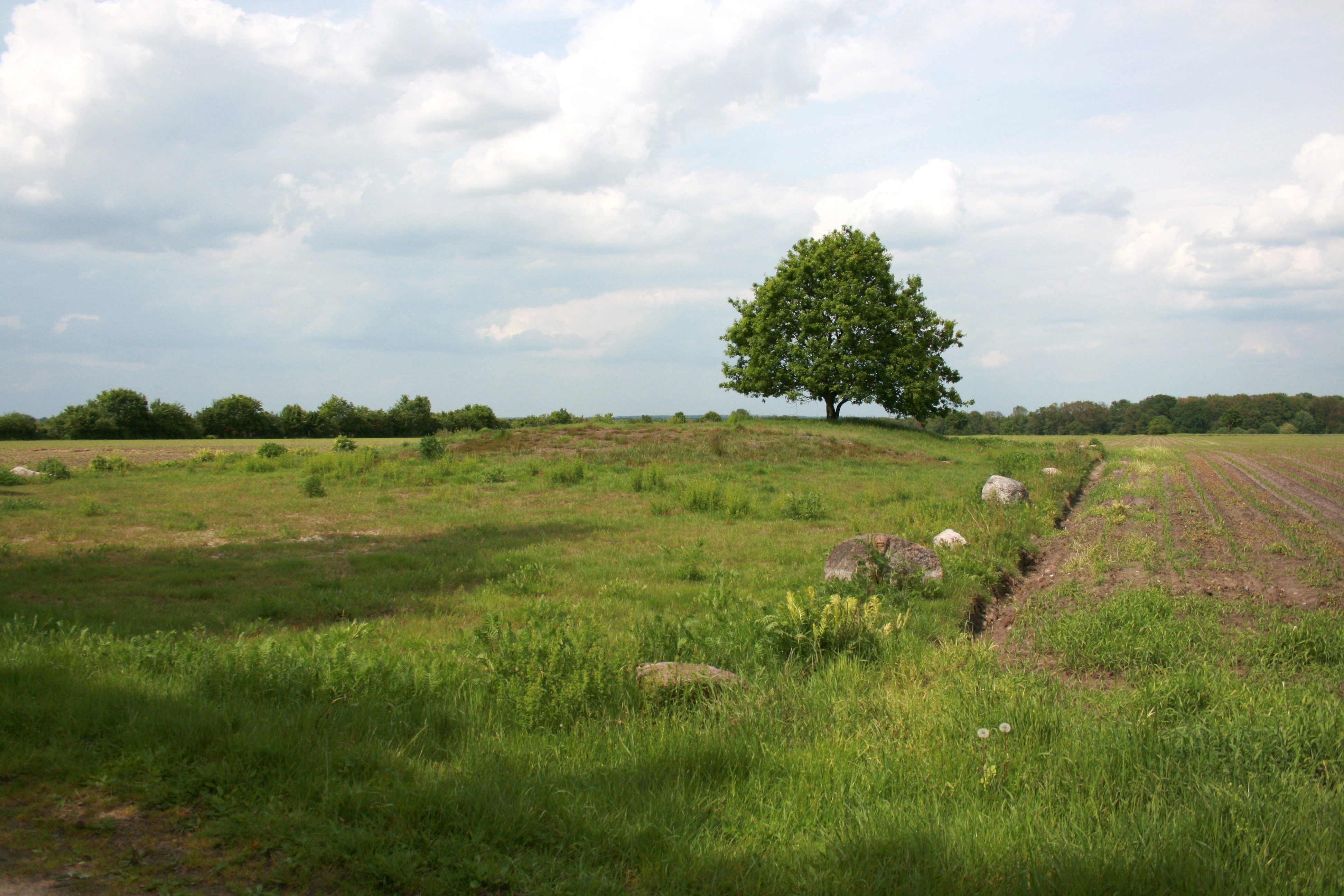 Hügelgräberfriedhof Hempberg in Rotenburg-Unterstedt